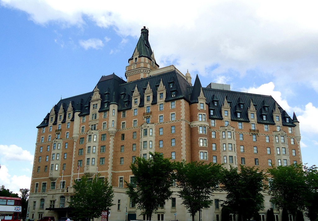 Saskatoon's Castle.